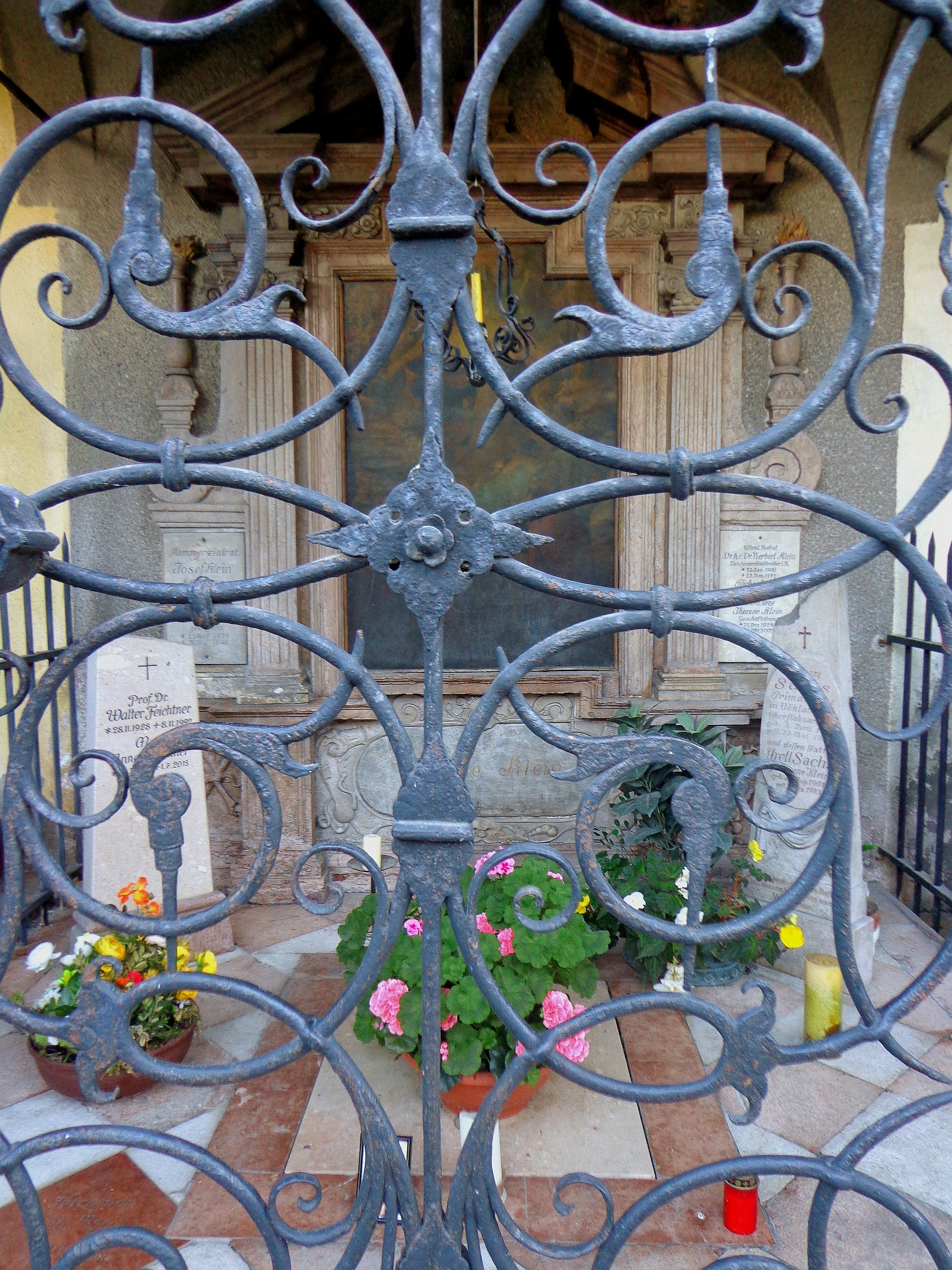 Crypt 51 (Petersfriedhof Salzburg) Klein